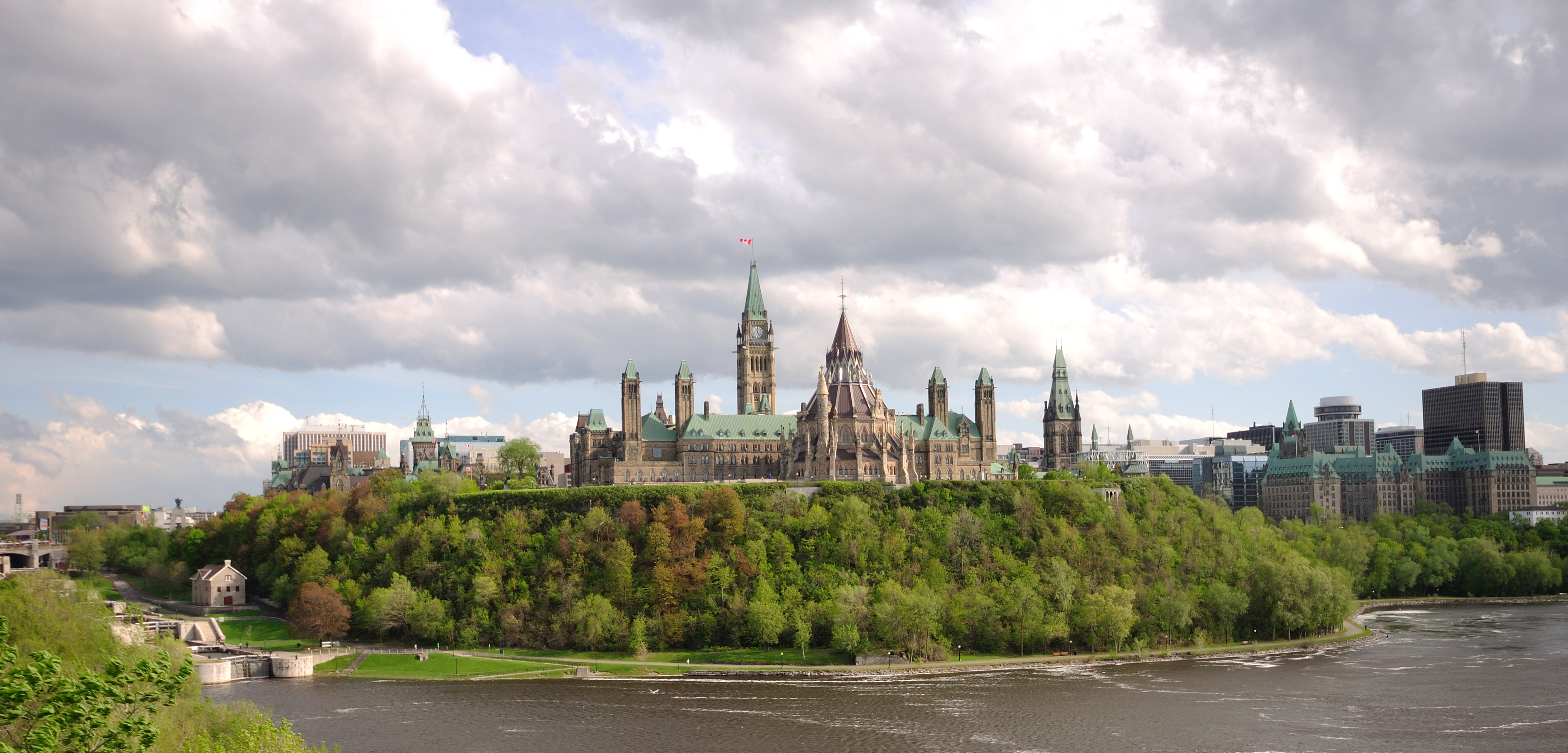 Ottawa: Stadtansicht auf den Parliament Hill vom Majors Hill Park aus, links vom Parlament erkennt man die Staustufen des Rideau Canal, rechts am Rand steht das mit 112 m höchste Gebäude der Stadt Place de Ville II